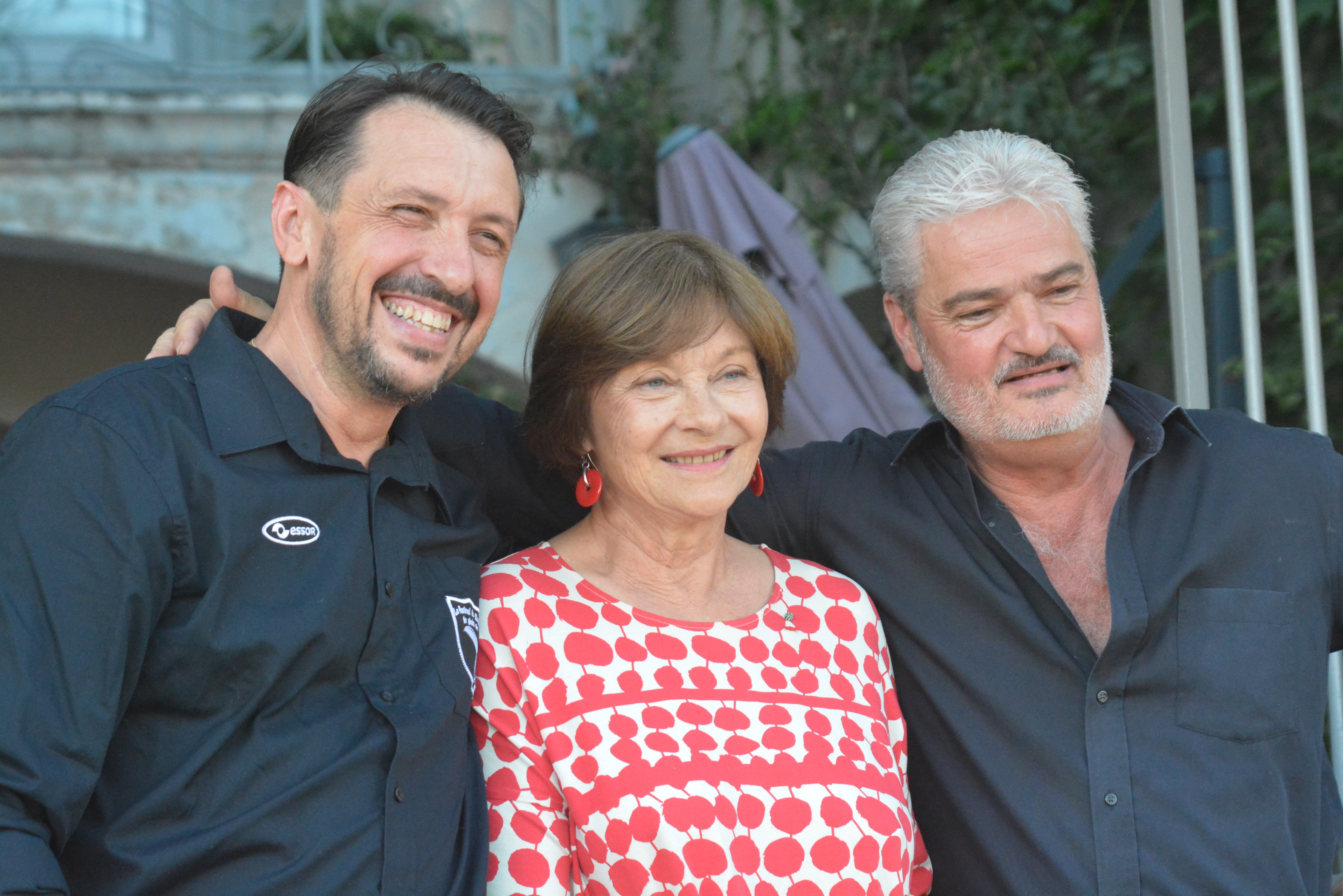 Pour la 11ème édition du festival de cinéma en plein air de visan